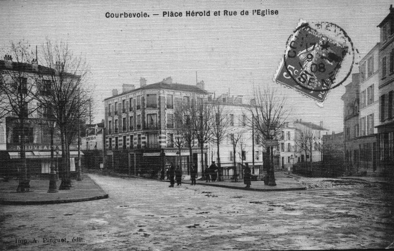 Courbevoie: Place Hérold et rue de l'Eglise